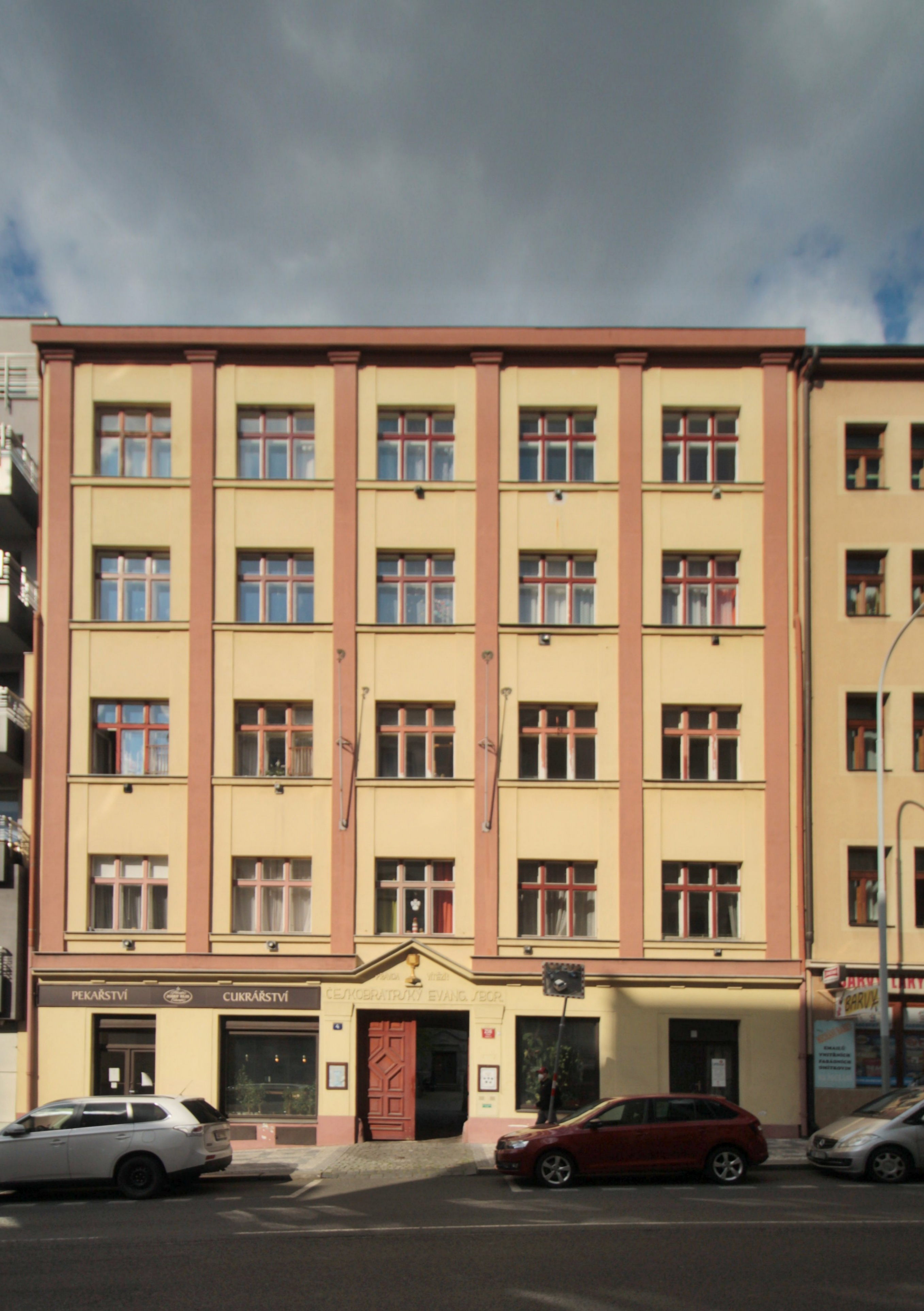 Žižkov, Betlémská kaple